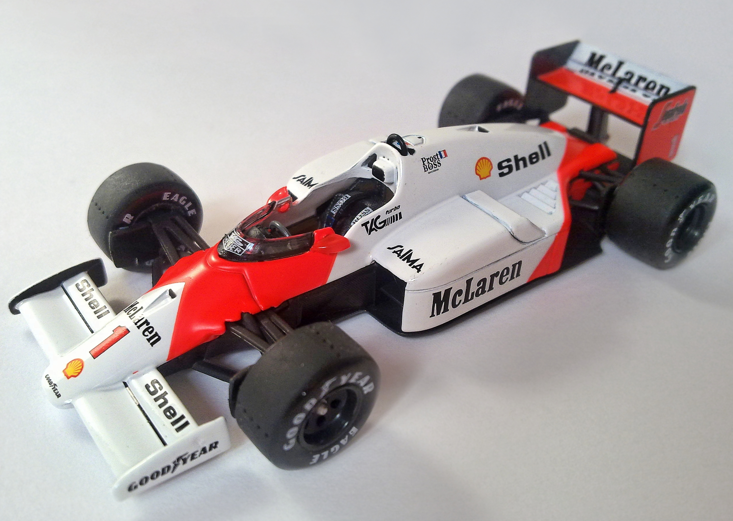 McLaren MP4/2C